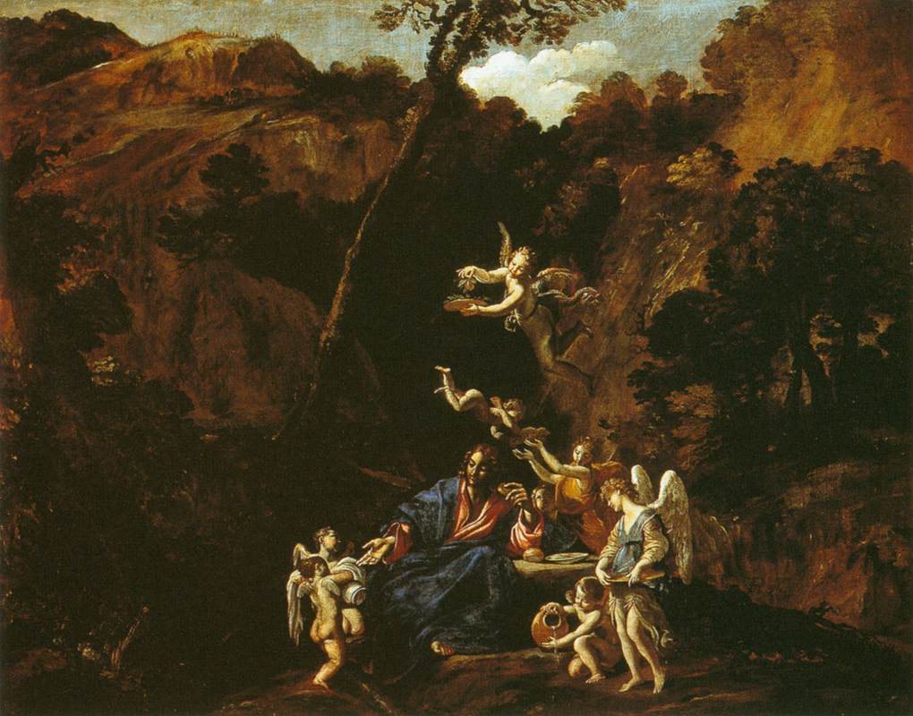 cm 116 x 143)